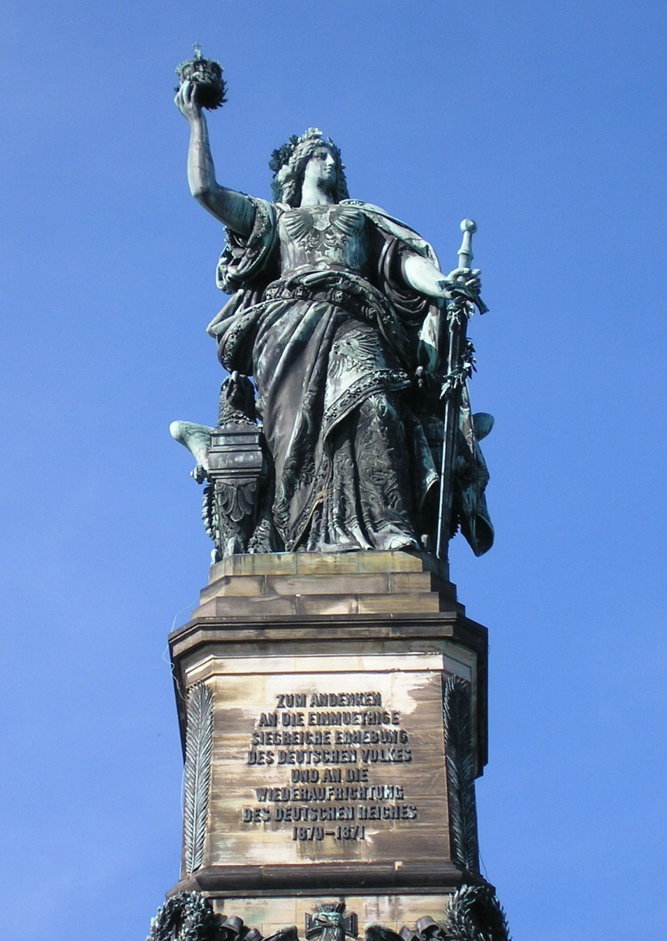 Niederwald Memorial, near Rüdesheim/ Germany